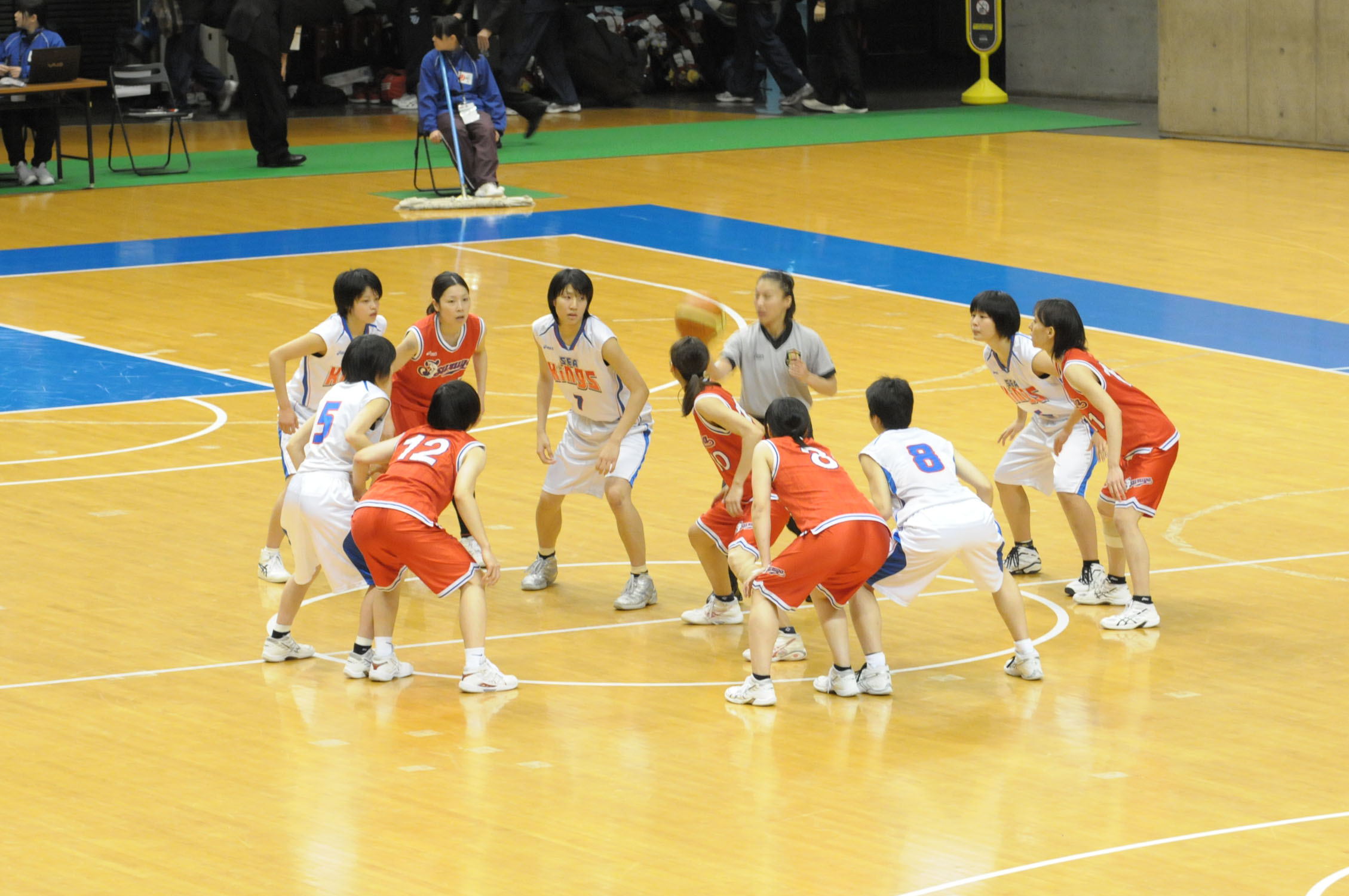 2012年全日本総合バスケットボール選手権大会2回戦、金沢総合高校対鶴屋百貨店。東京体育館で。